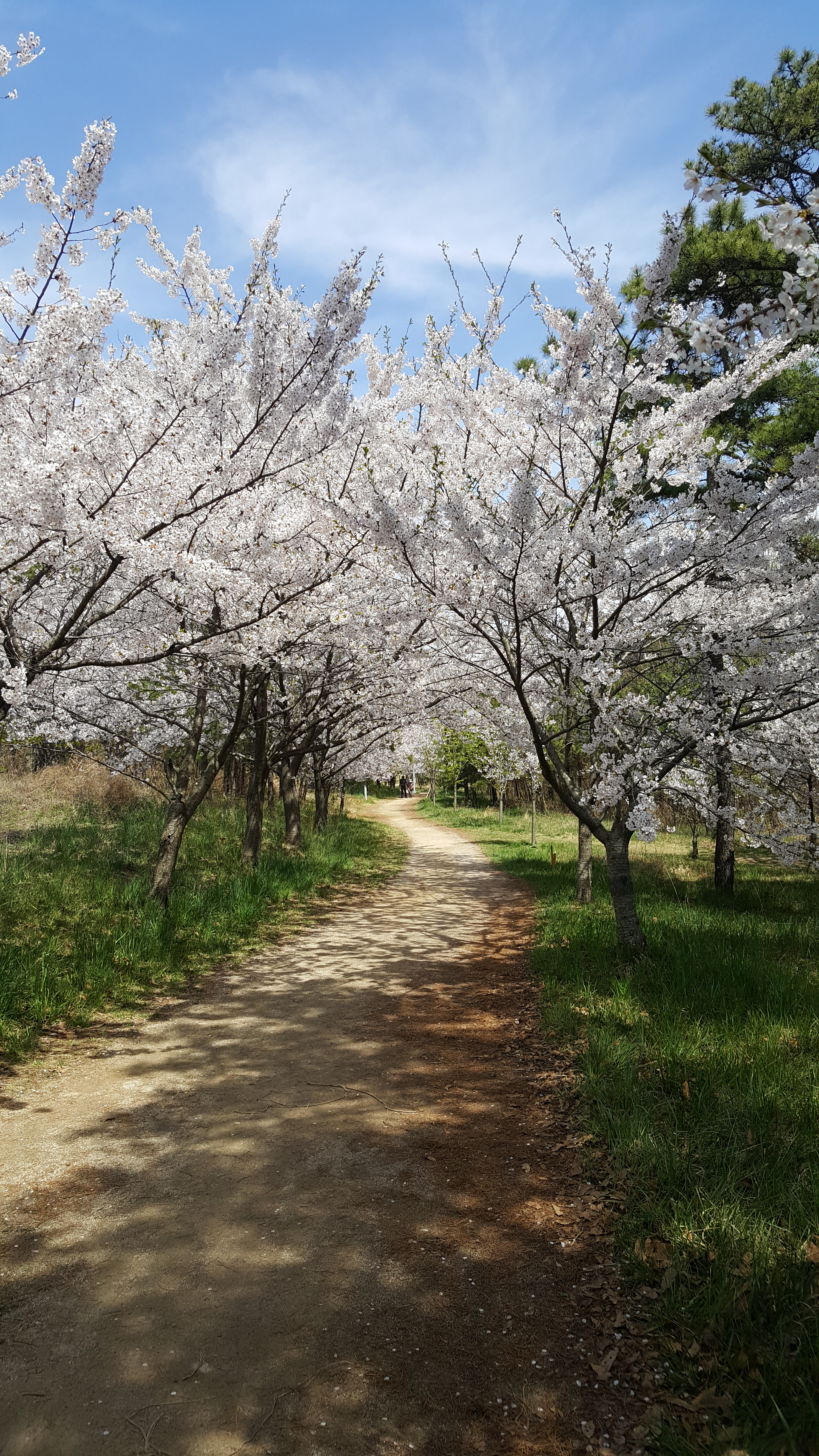 건강백년길 벚꽃길